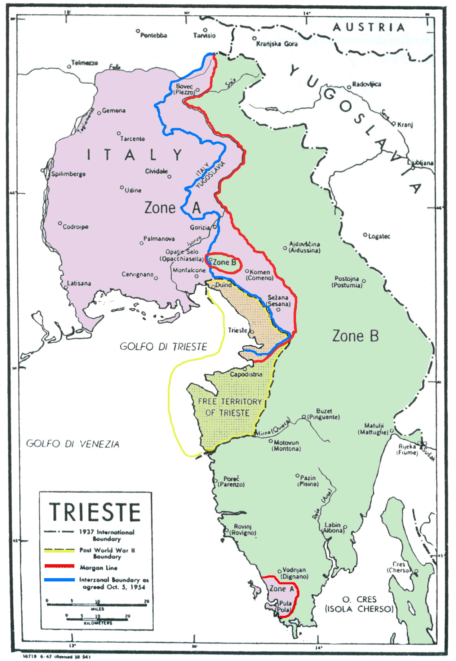 Modificazione personale di immagine già presente, scansionata da documento del Governo Federale USA